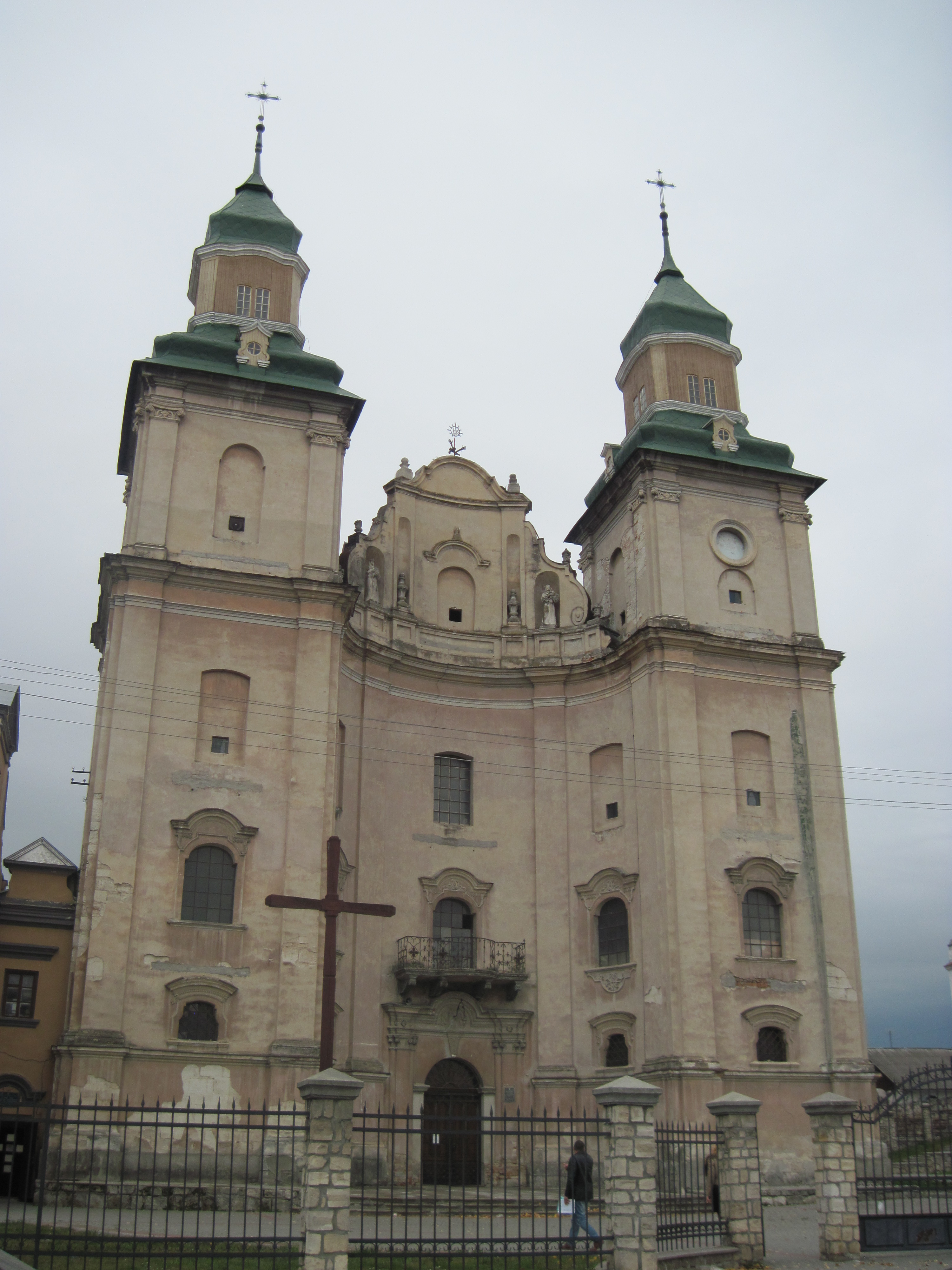 Костел бернардинів, Збараж, осінь 2014